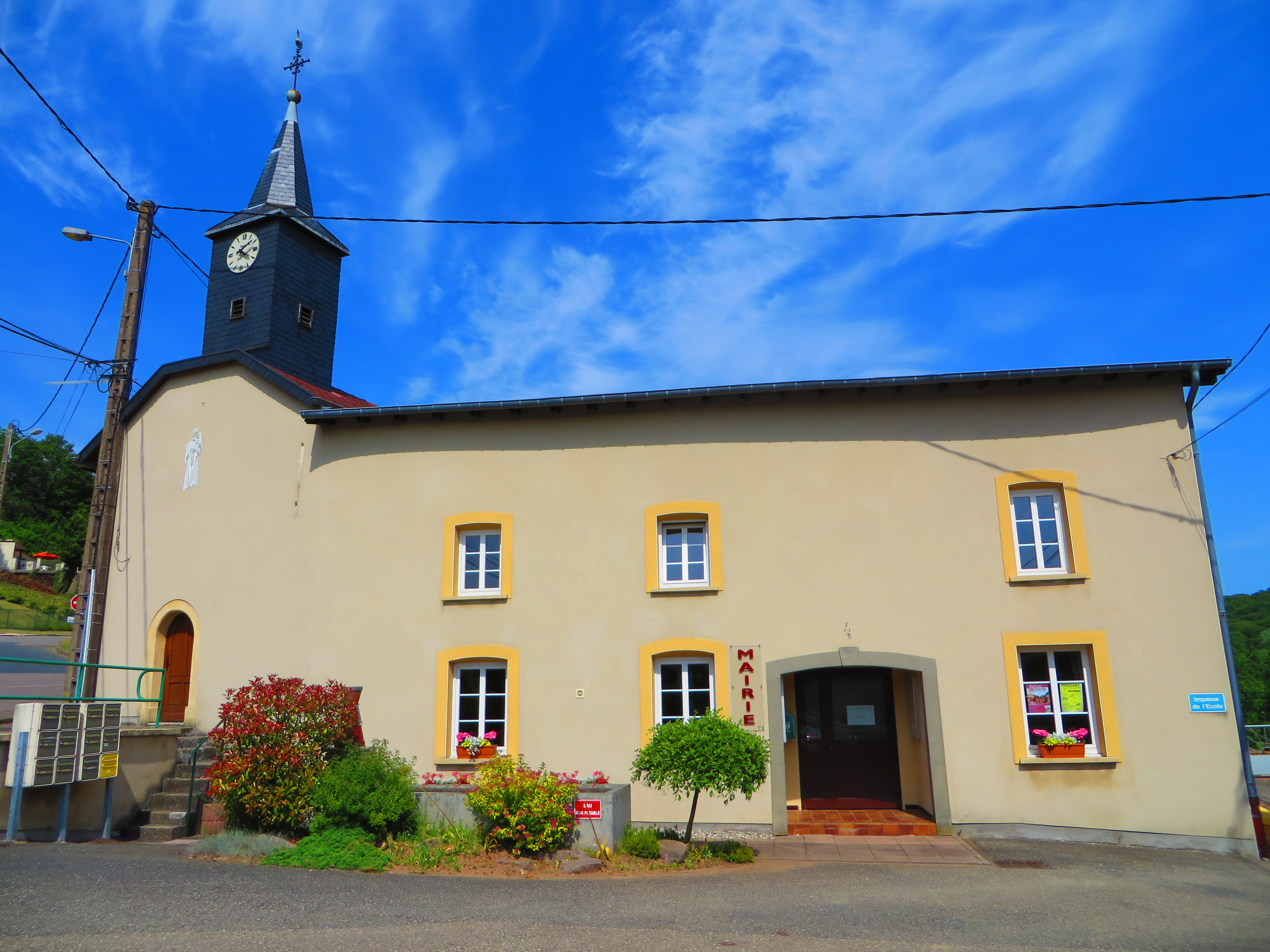 Hallering eglise et mairie